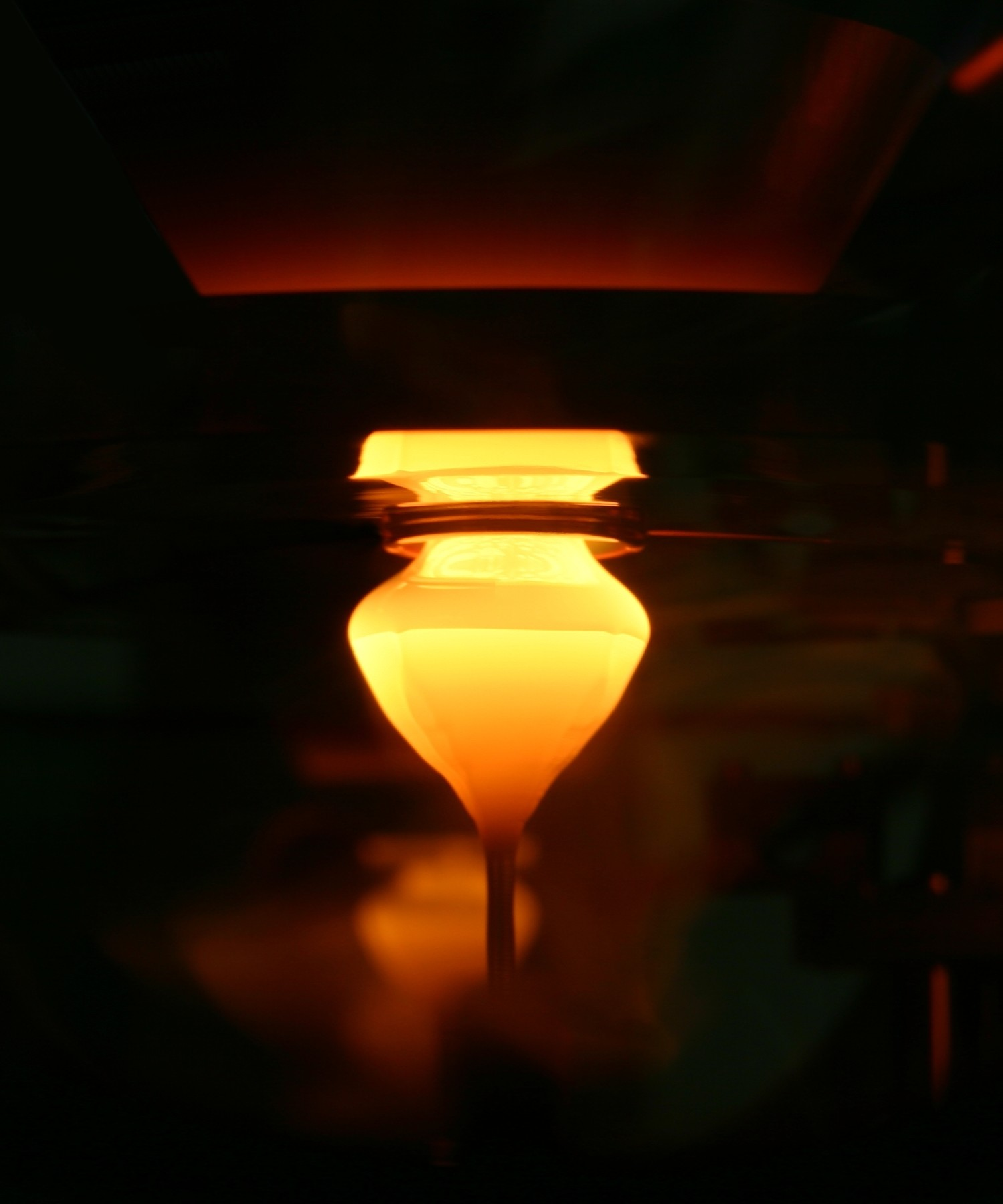 Beginn des Silizium Floatingzone-Prozess